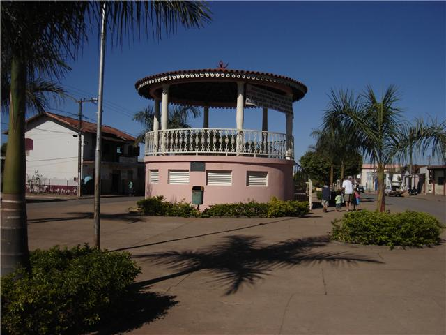 Coreto da Praça Central da cidade de Varjão de Minas, MG., Brasil.